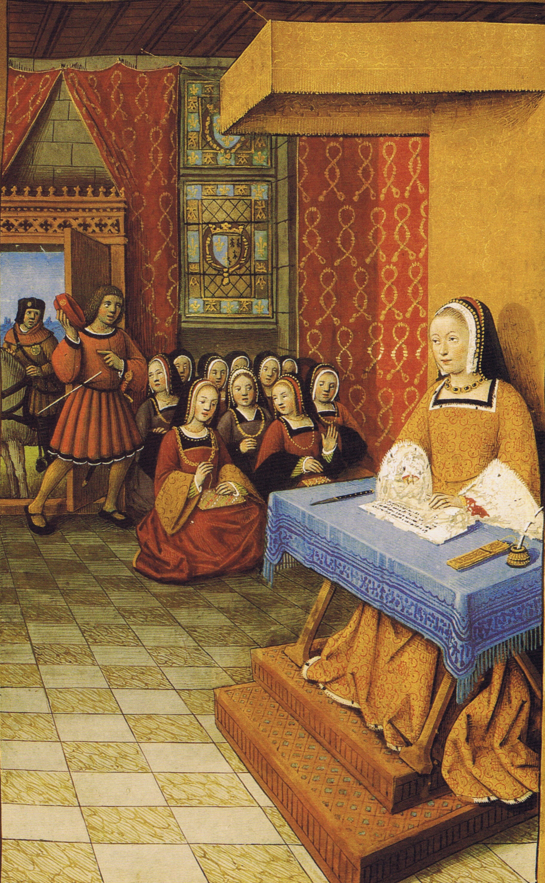 Queen Anne of Brittany in her court